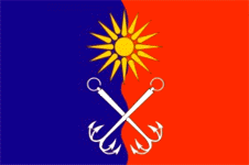 Флаг города Отрадное Кировского района Ленинградской области